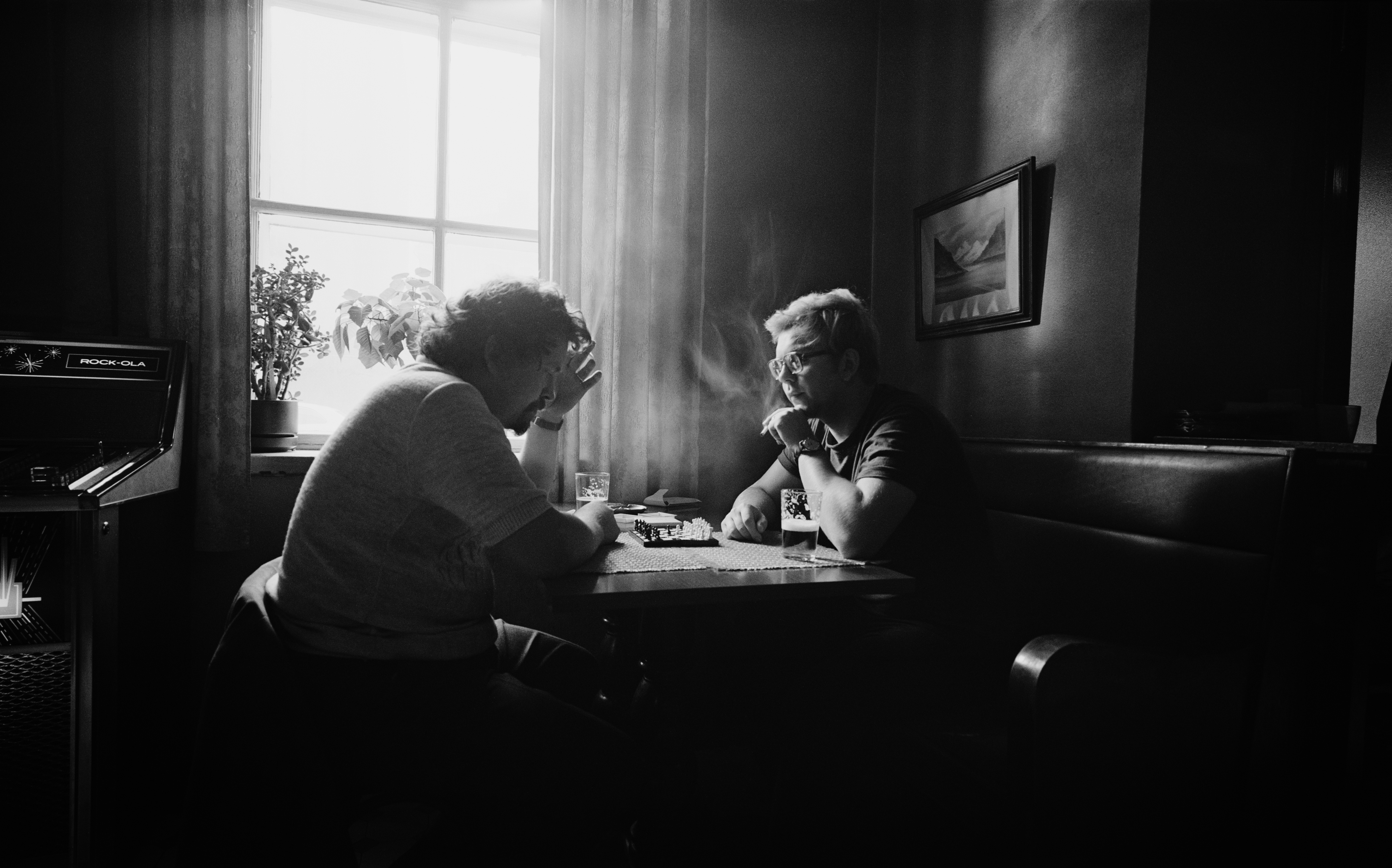 Ravintola Laatu-Haiti, Helsinki, Snellmaninkatu 19; kuvassa pelaavat shakkia Helsingin yliopiston psykologian laitoksen assistentit Korkala (nimi epävarma) ja Pekka Arinen